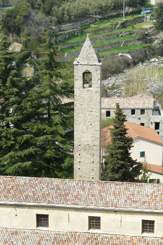 Campanile della Chiesa di Santo Spirito, Ceriana, Liguria, Italia